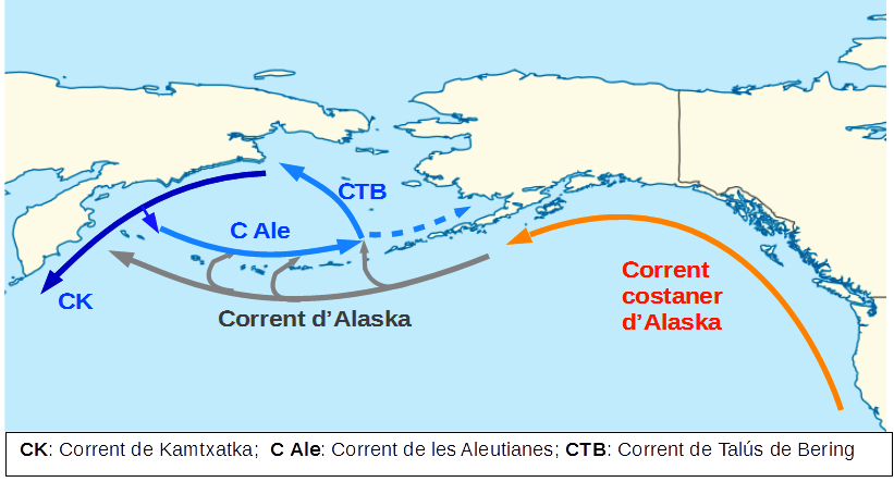 Corrent de les Aleutianes (C.Ale) dibuixat amb altres corrents relacionats del Pacífic i de la mar de Bering